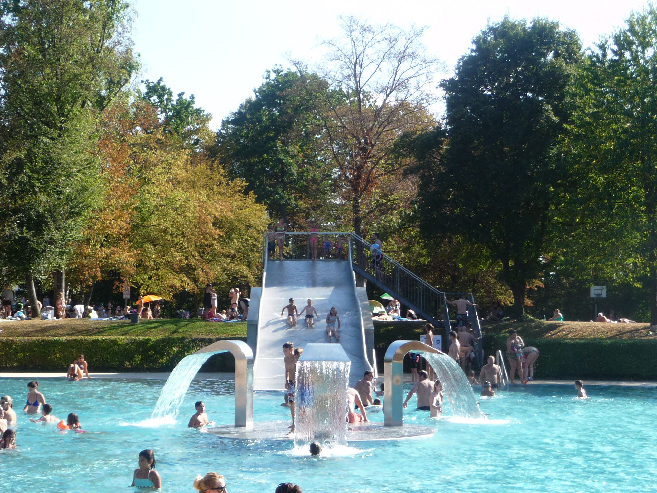 Badezentrum Sindelfingen – Zwillingsrutsche und Schwalldusche im Erlebnisbecken